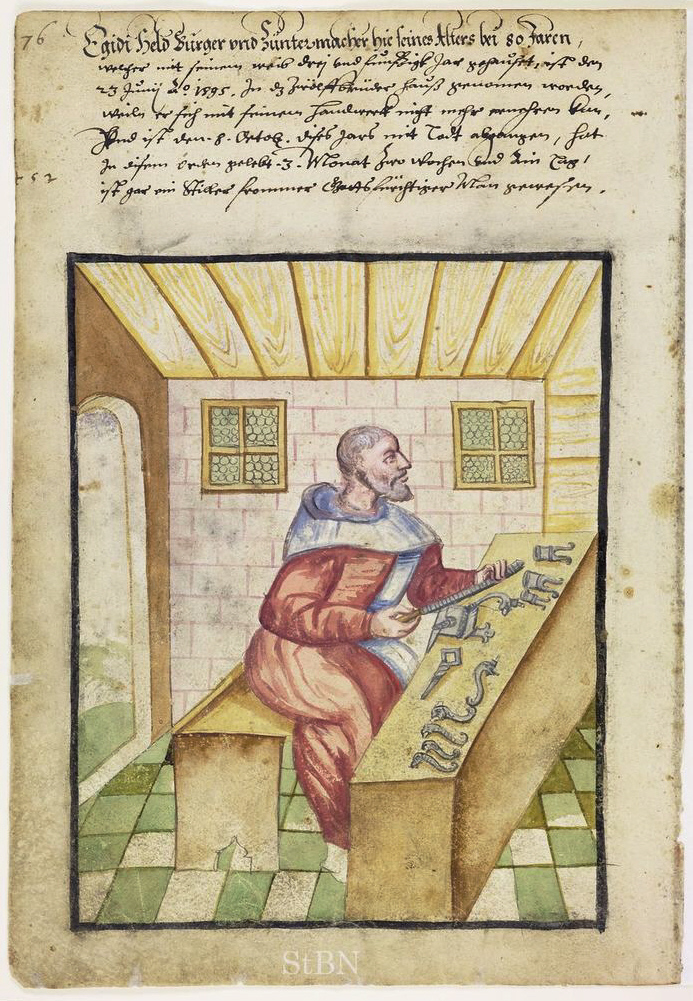 Egidi (Egidius; Agidius) Held, Züntermacher (Zündermacher; Schlosser) Transkription und weitere Informationen